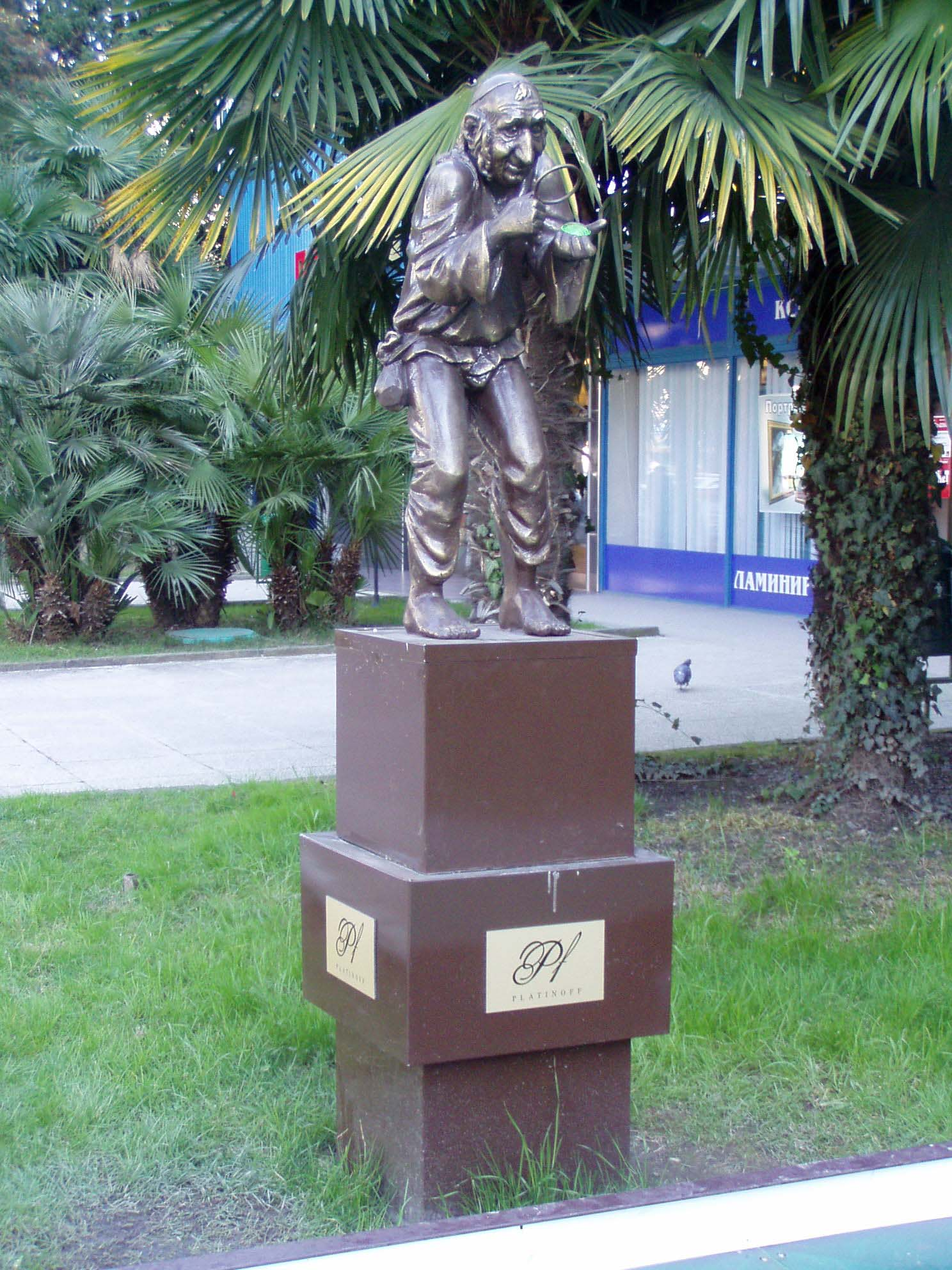 Памятник ростовщику. Сочи